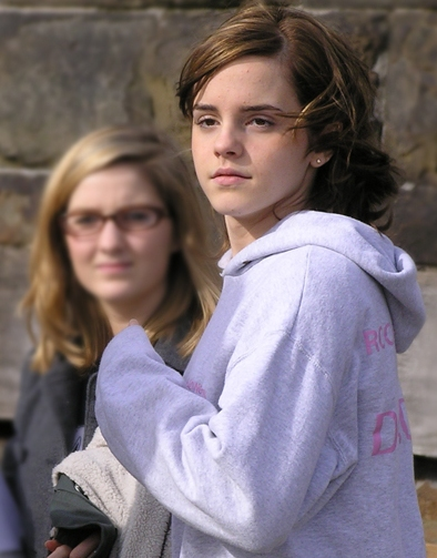 Atriz Emma Watson